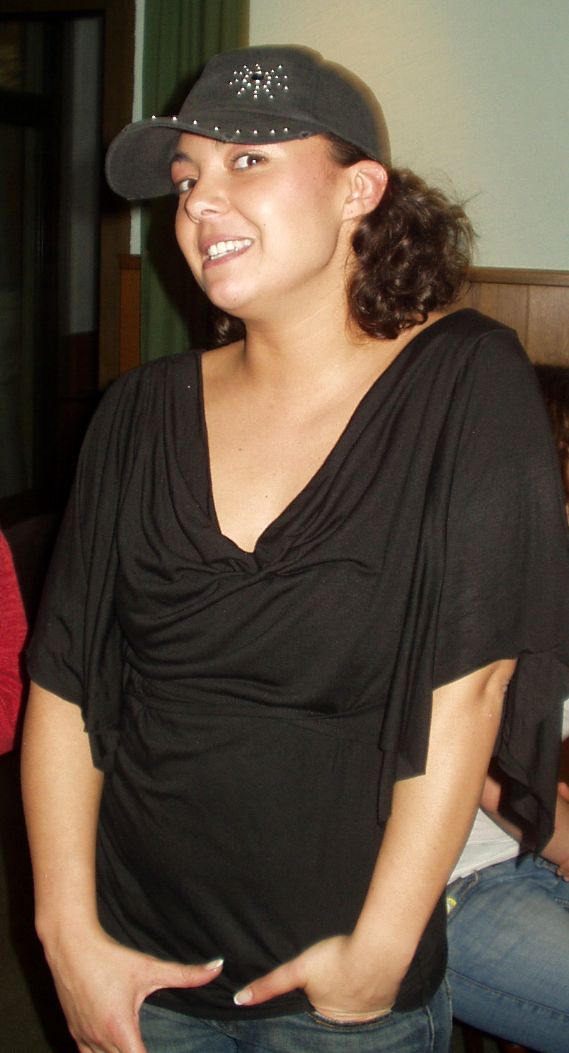 Jazzy beim Fanclubtreffen in Mainz 2006